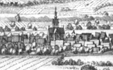 St. Martin (Nörten-Hardenberg) von Merian